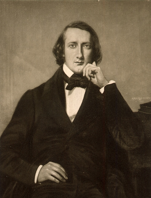 Reproduction en héliogravure, 15 x 11 cm, vers 1895 du portrait de Henri Victor Regnault peint par son cousin Eugène-Emmanuel-Amaury Duval